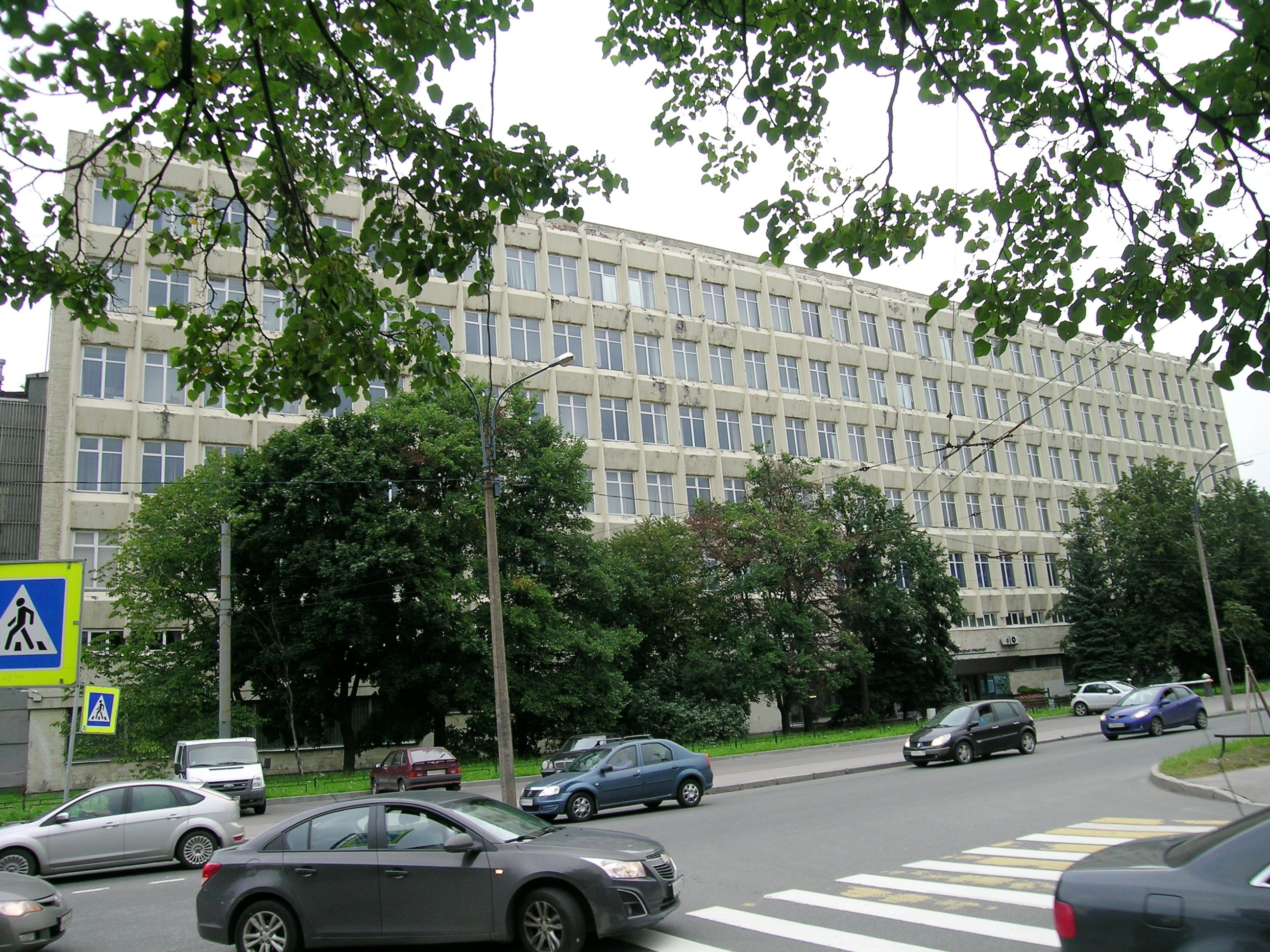 Научно-исследовательский институт командных приборов. 198216, Санкт-Петербург, Трамвайный проспект, д.16